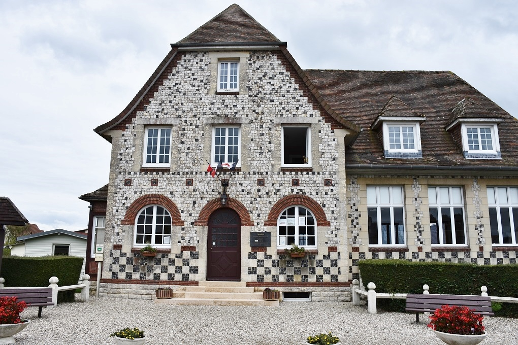 Mairie de Sainte-Marie-au-Bosc (76).